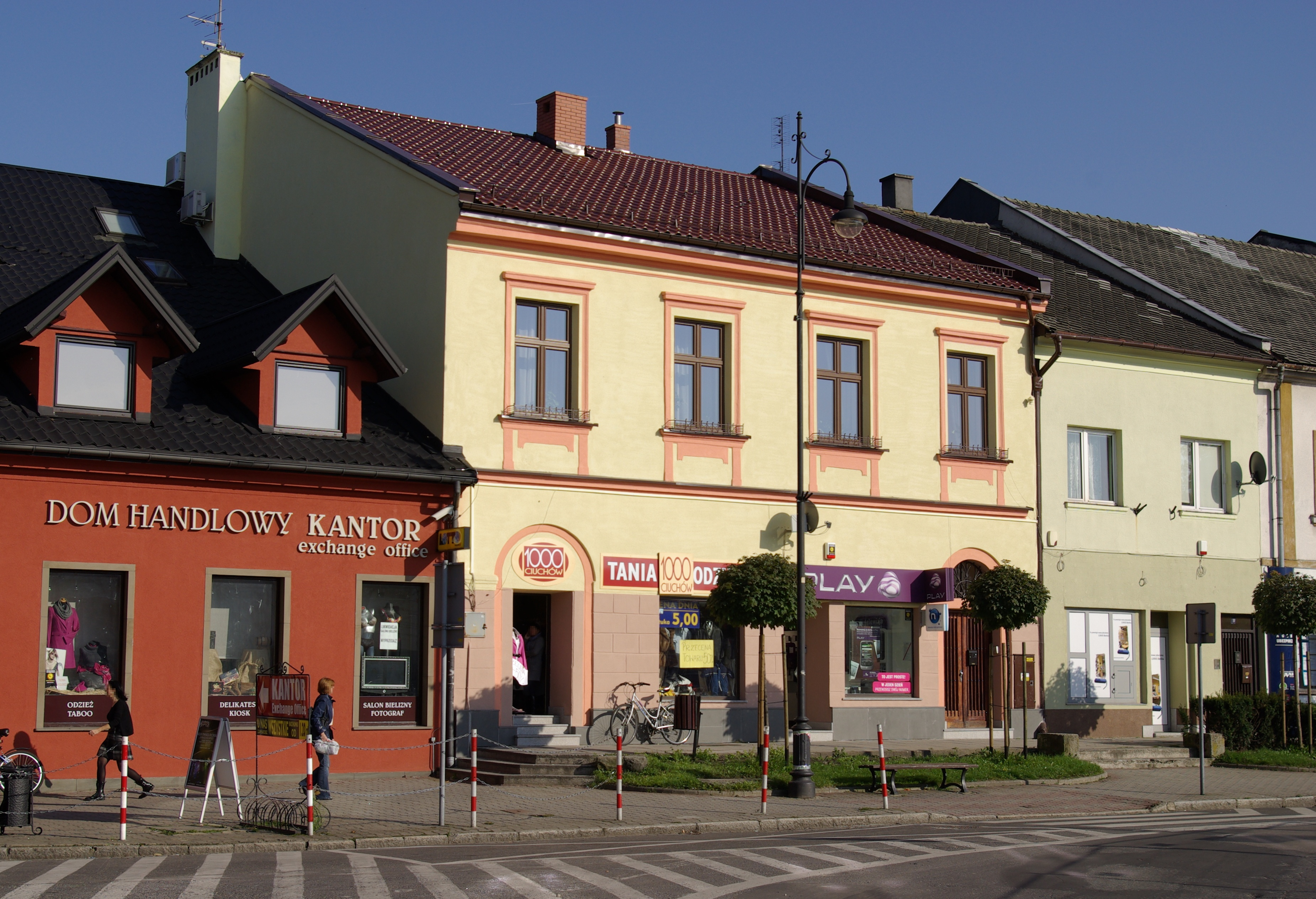 Kęty, Rynek 9